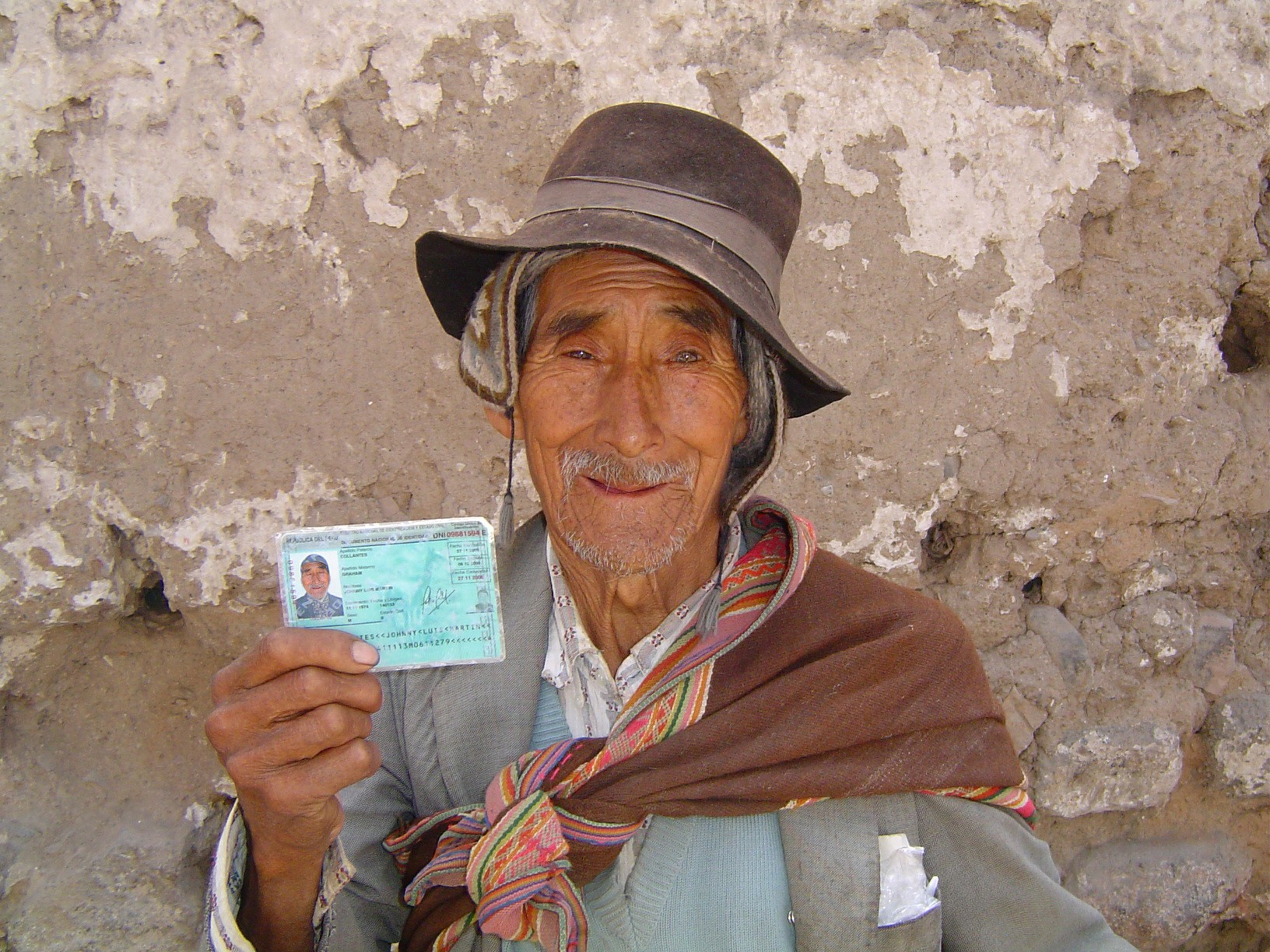 Poblador mostrando su documento de identidad recién adquirido